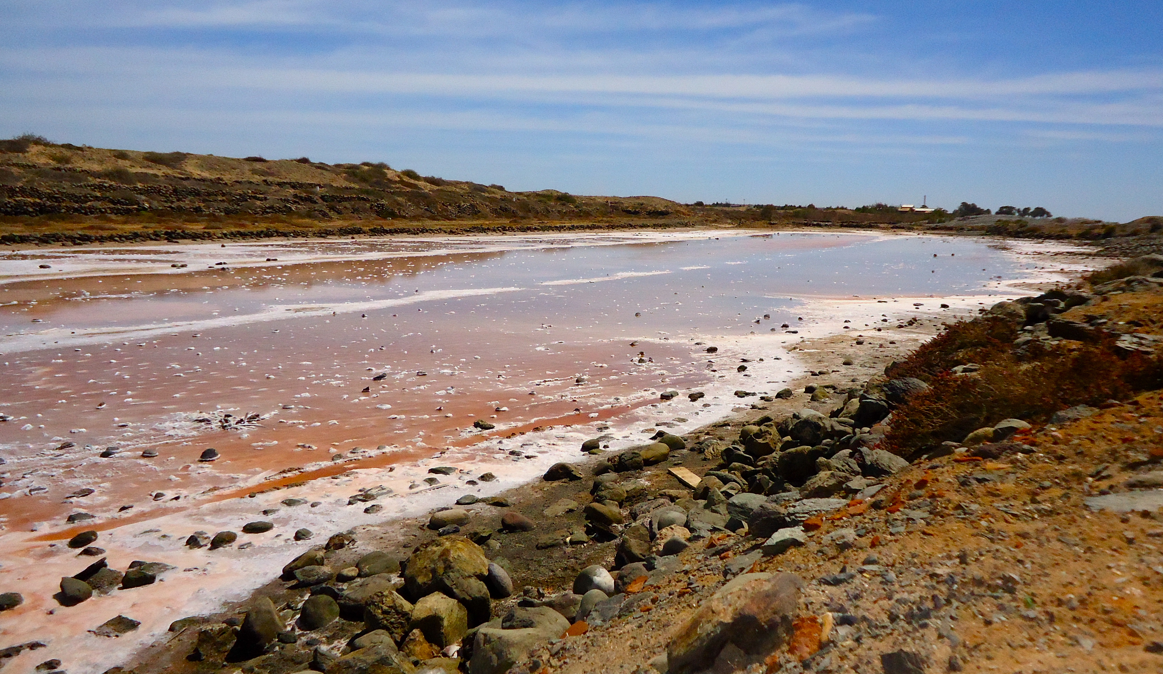 Juncalillo del Sur This is a photography of a Special Area of Conservation in Spain with the ID: ES0000112. Natura2000 entry, EEA entry